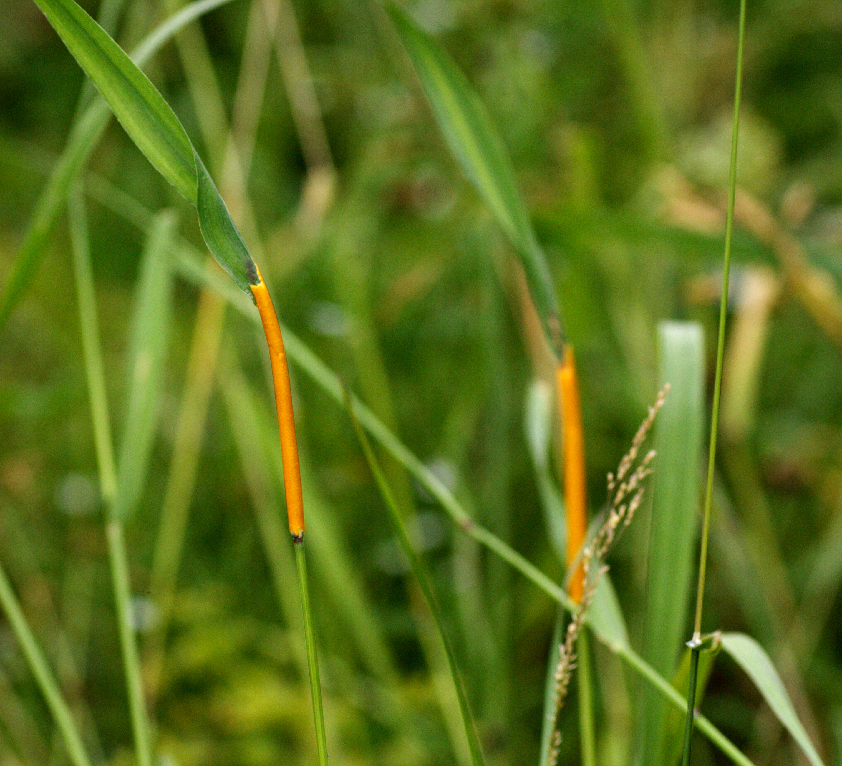 Kõrrerooste?, Põlvamaa